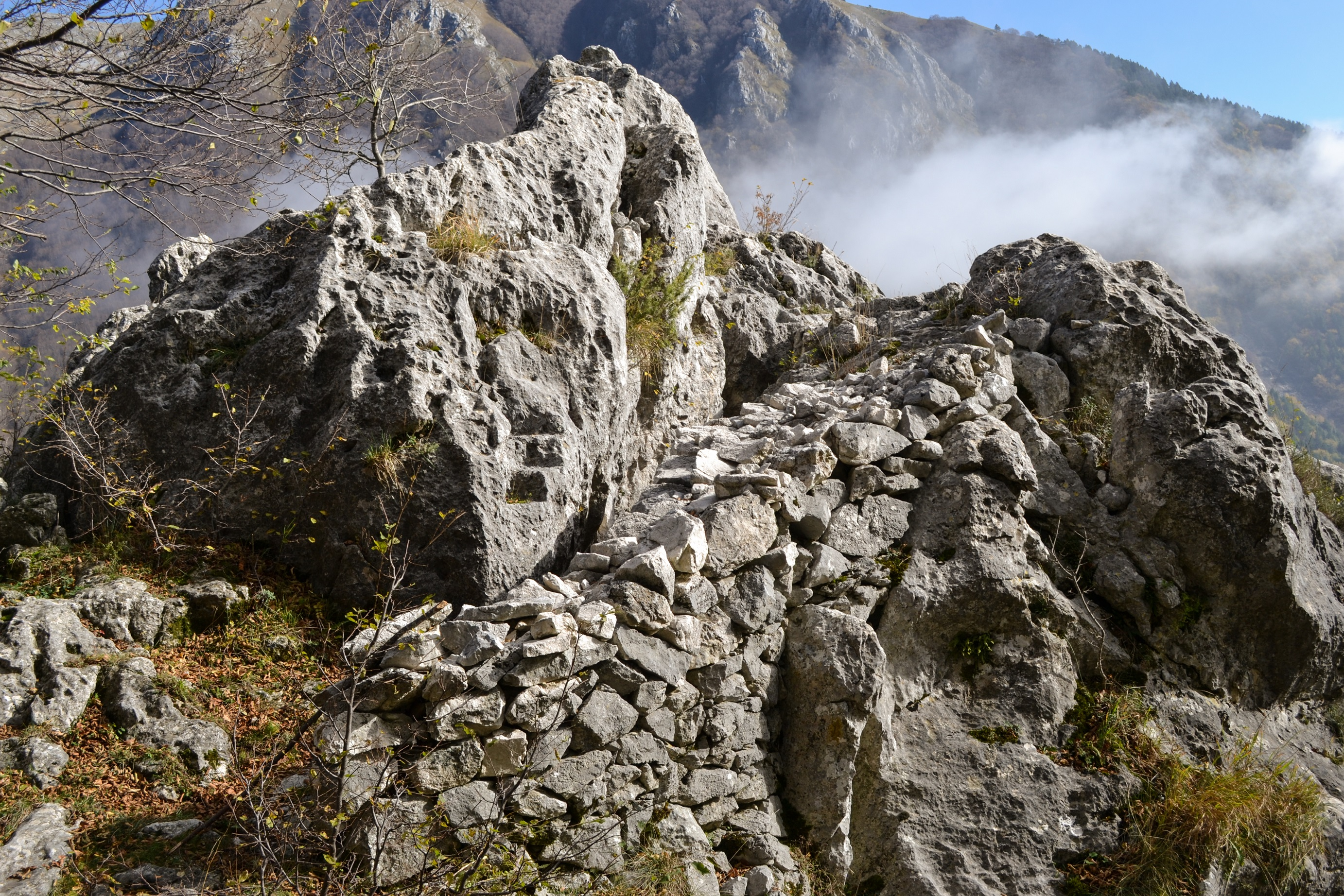 Postazione di veduta dei soldati tedeschi durante la seconda guerra mondiale